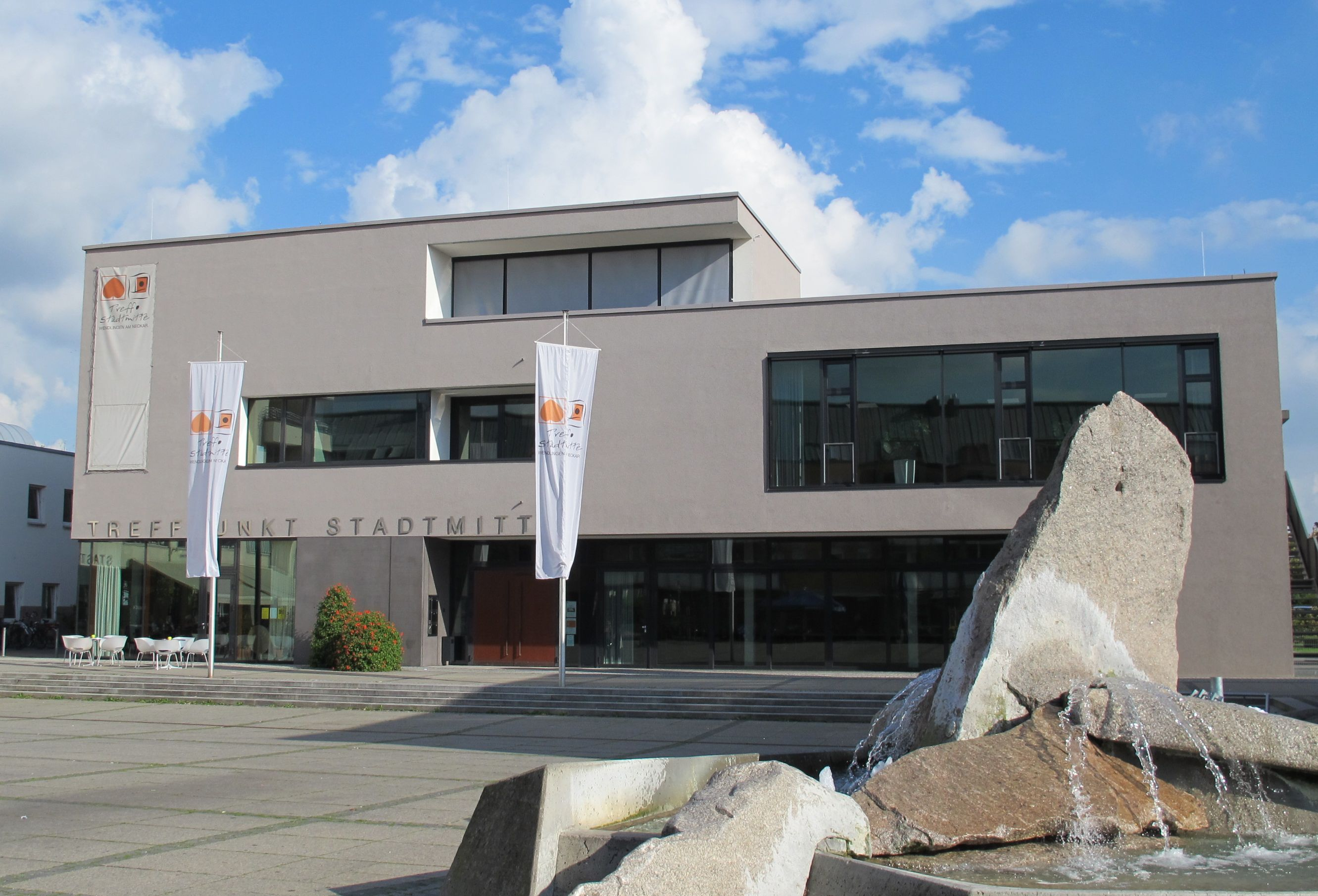 Eingang Treffpunkt Stadtmitte